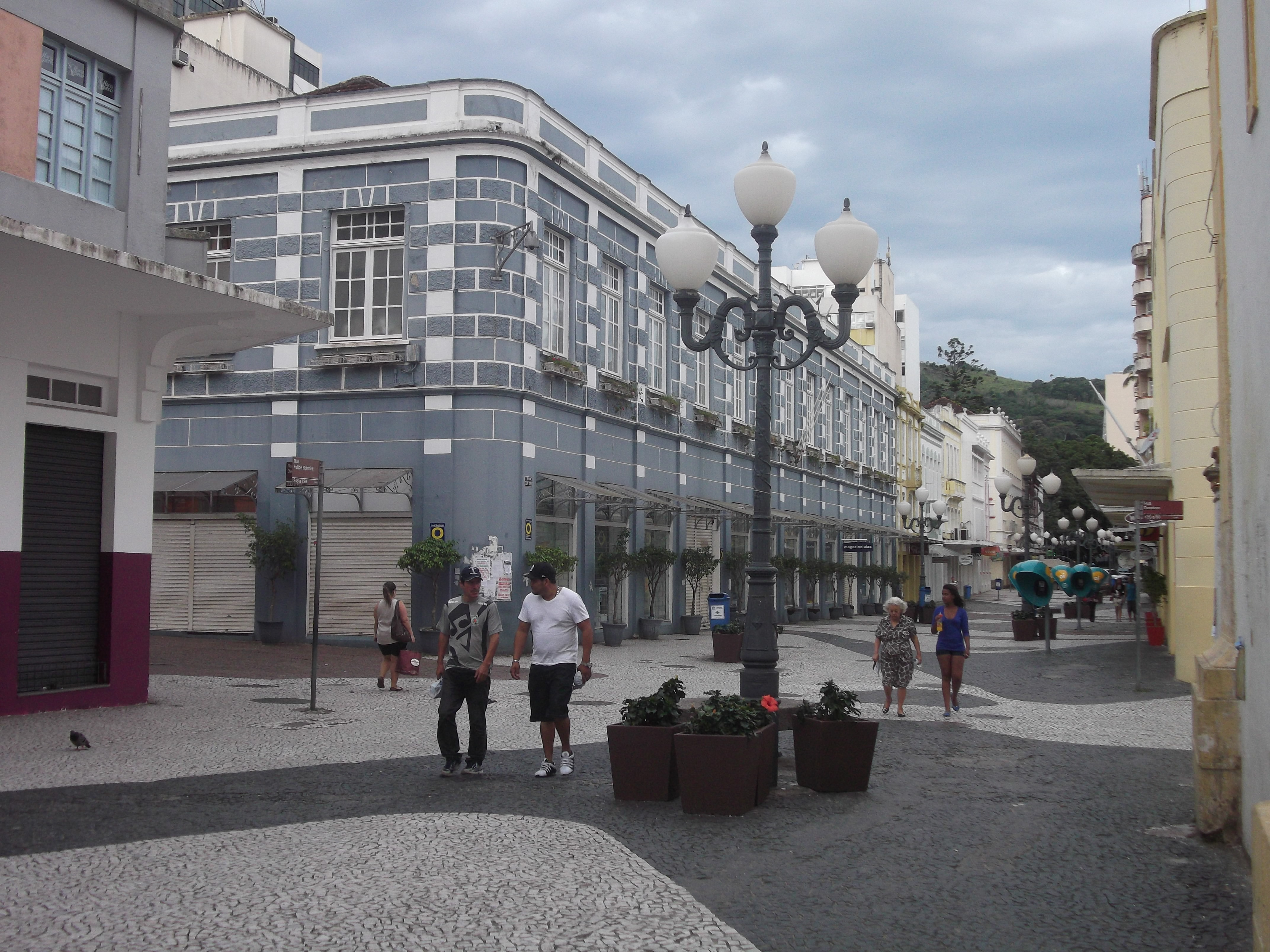 Florianópolis, Brasil 2014-04-18